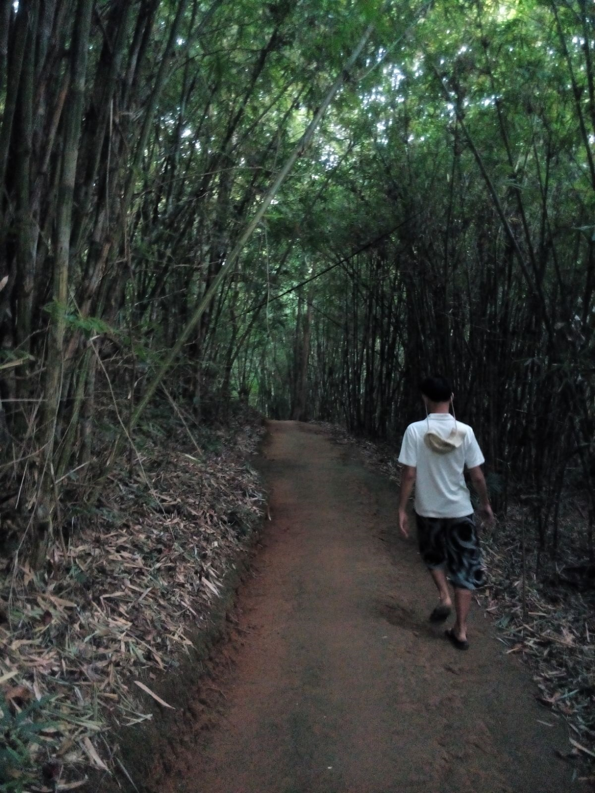 Hutan Buluh Thailand